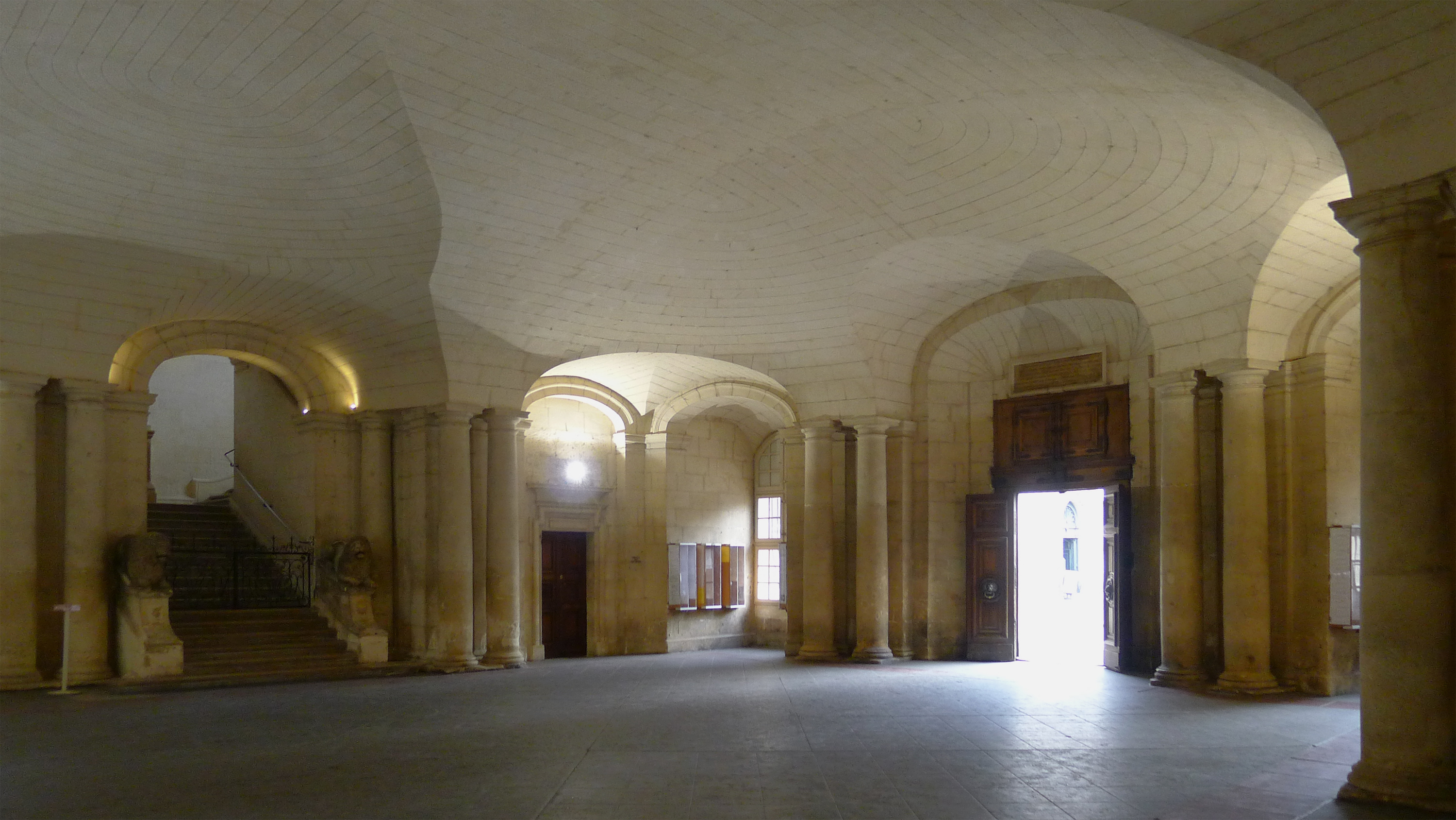 Hôtel de Ville (salle rez-de-chaussée) d'Arles (BdR, France) .